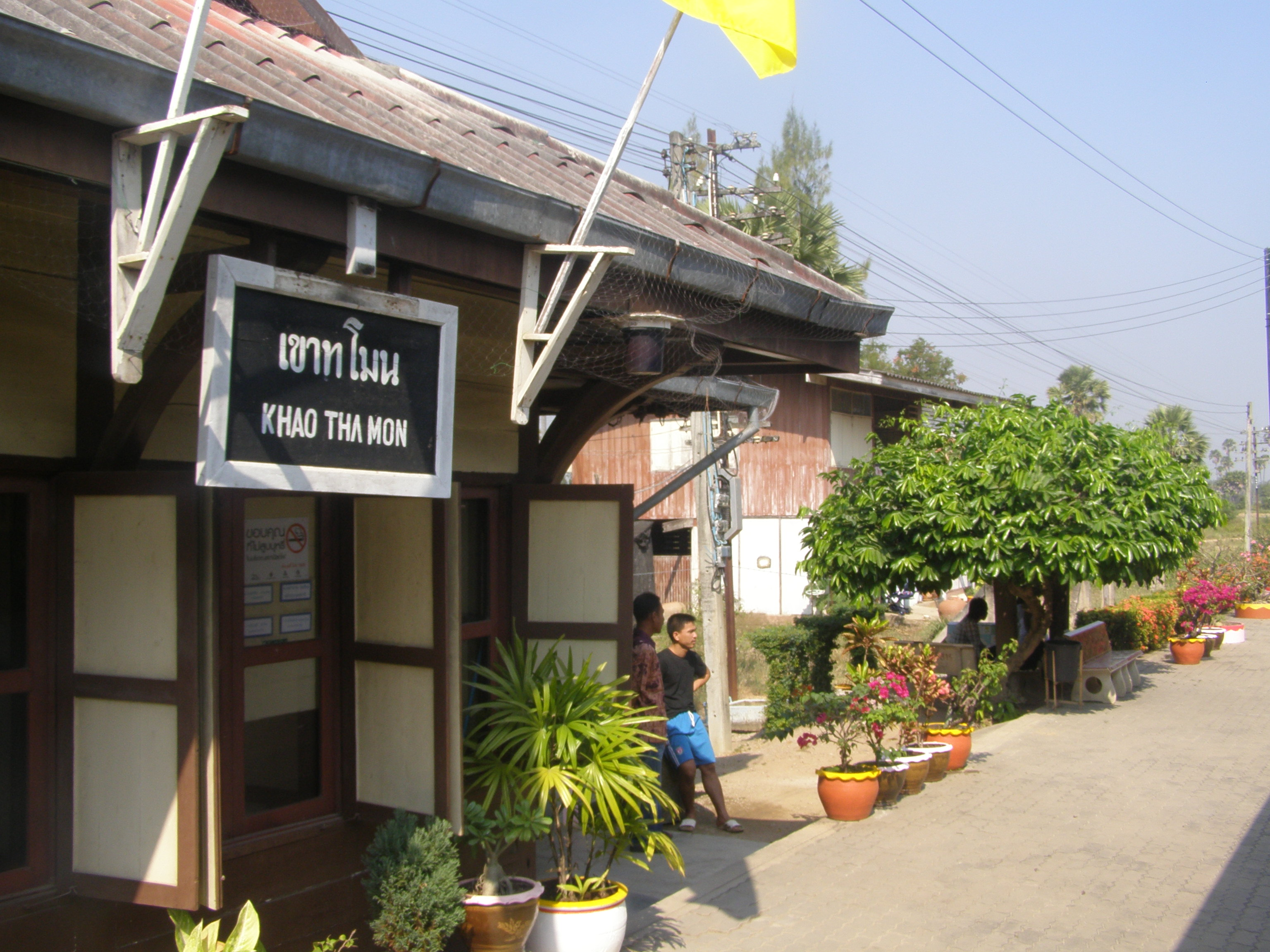 สถานีรถไฟเขาทโมน